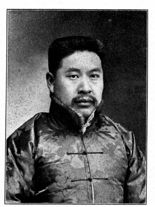 中文（台灣）: 王試功議員